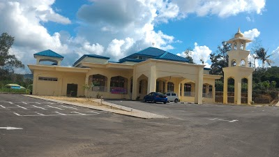 Masjid Daerah Nabawan Baru